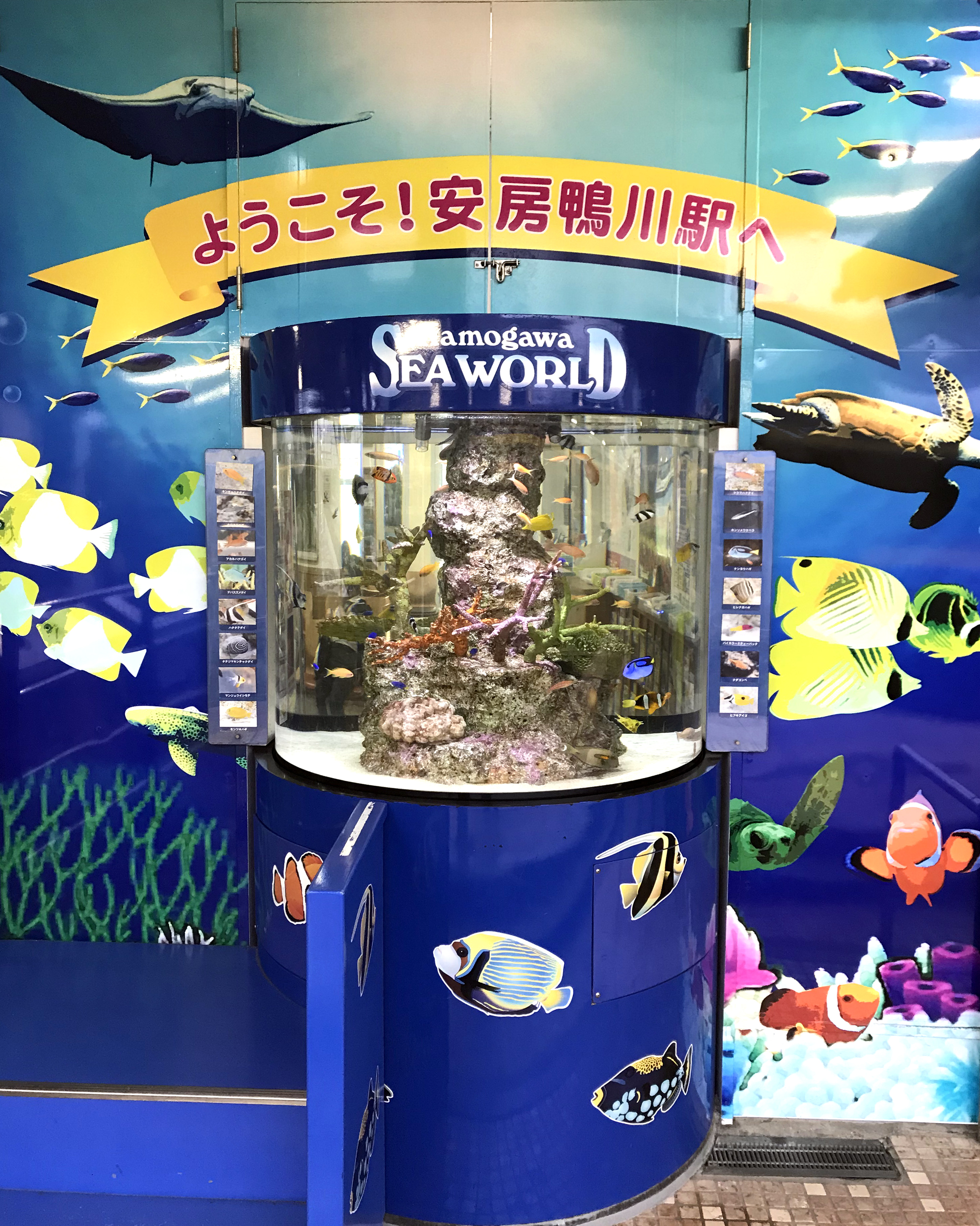 安房鴨川駅の改札隣、熱帯魚水槽